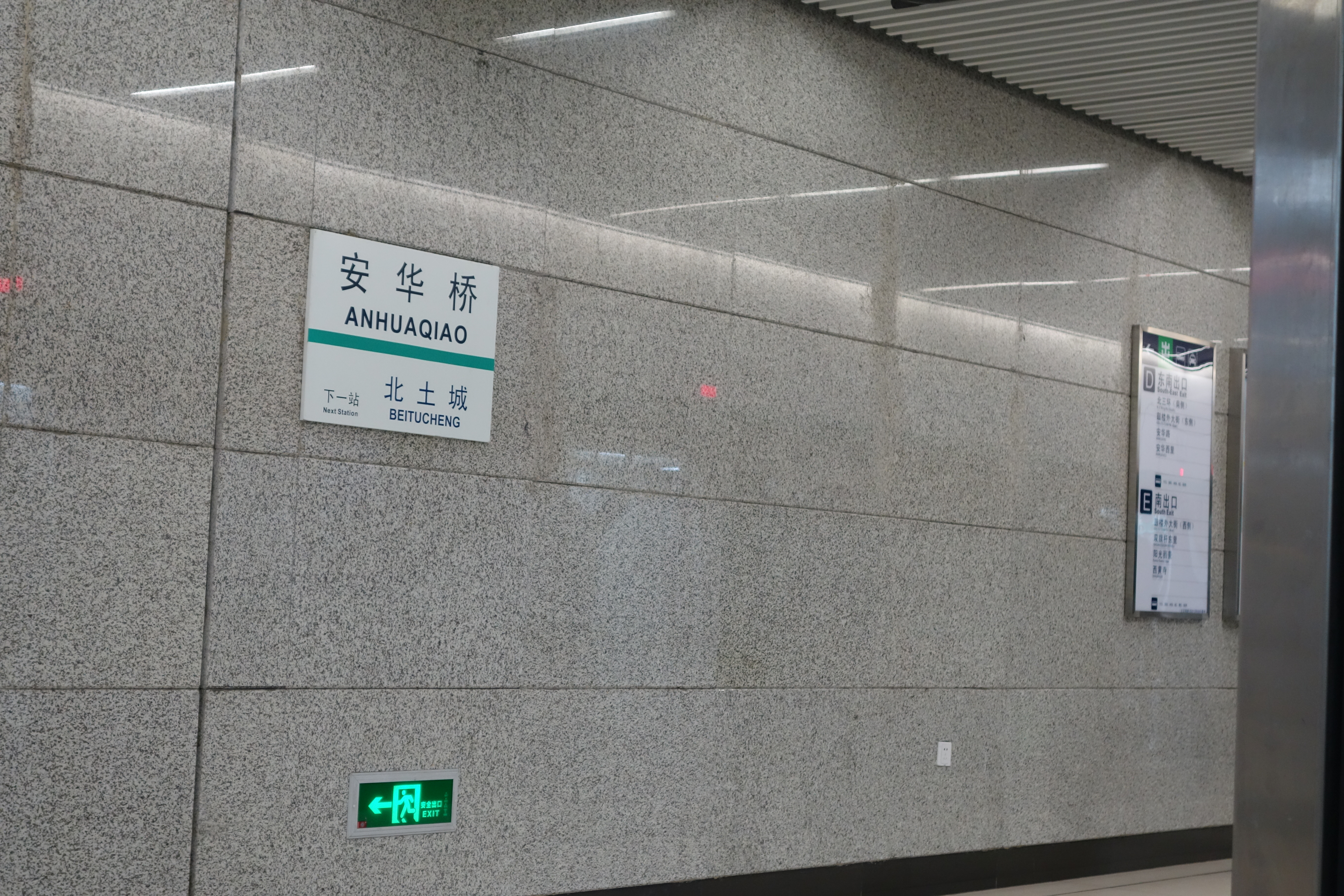 安华桥站站名牌